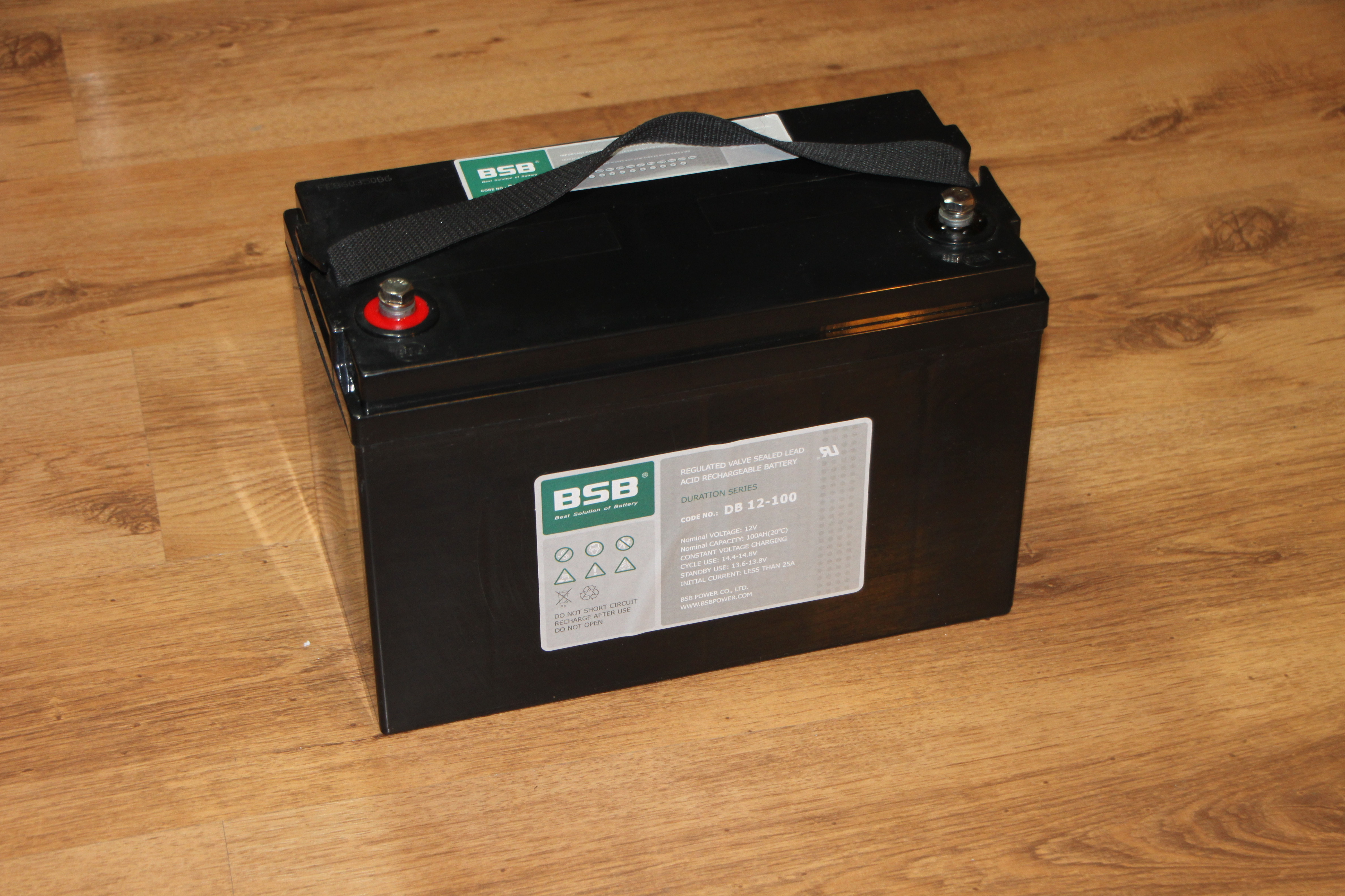 AGM battery DB12-100, 12 Volt, 100 Ah, 30 kg